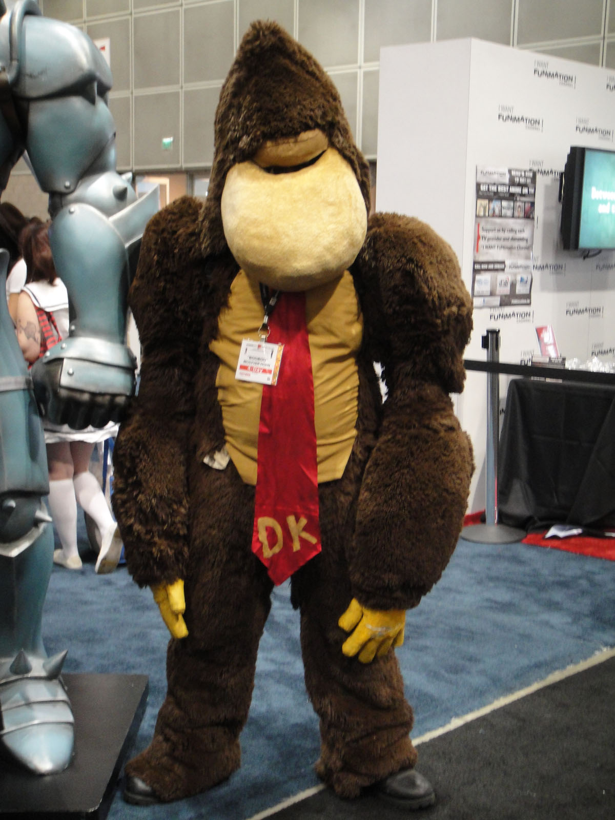 Anime Expo 2011 - Donkey Kong